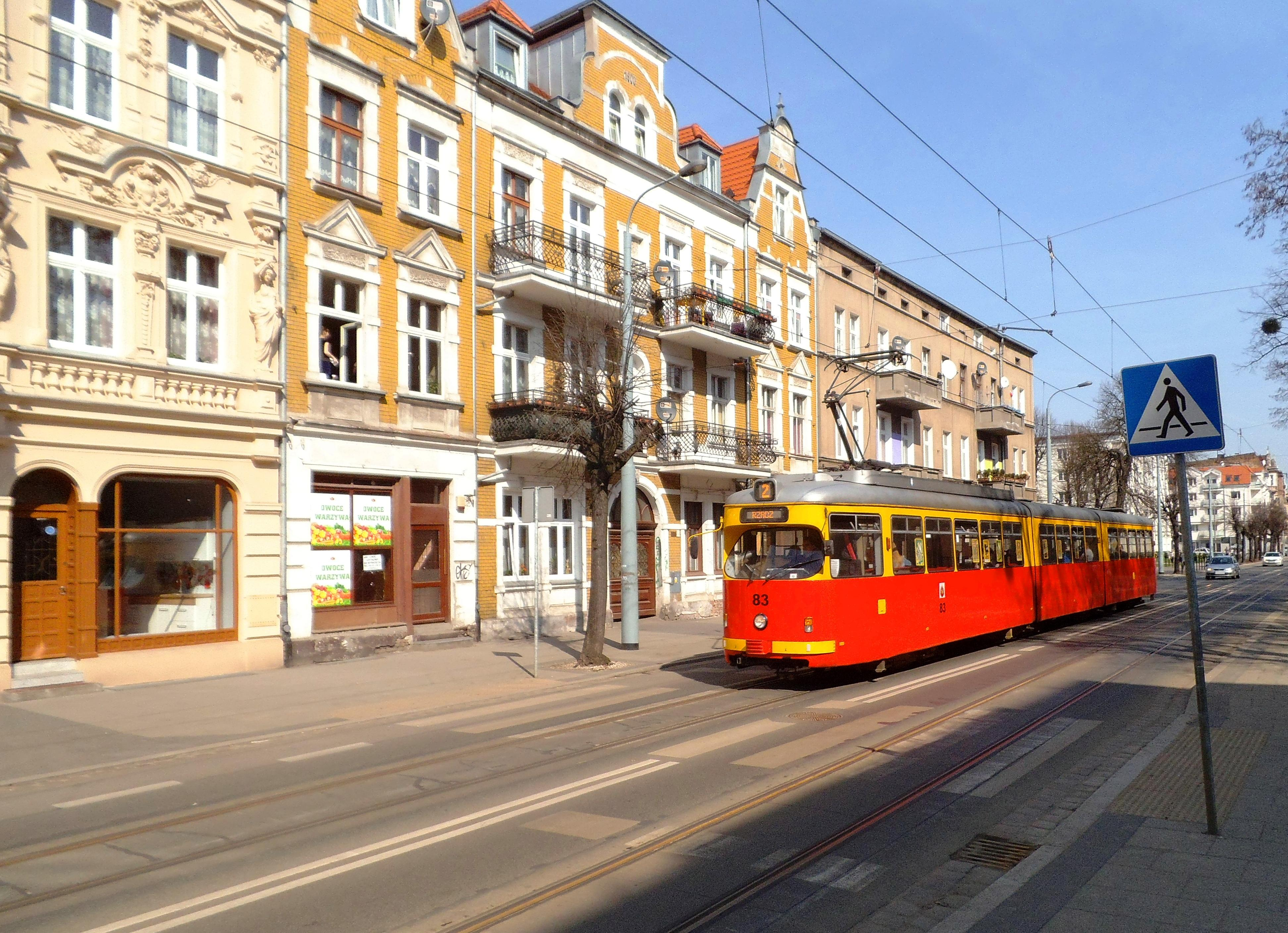 Ulica Legionów w Grudziądzu